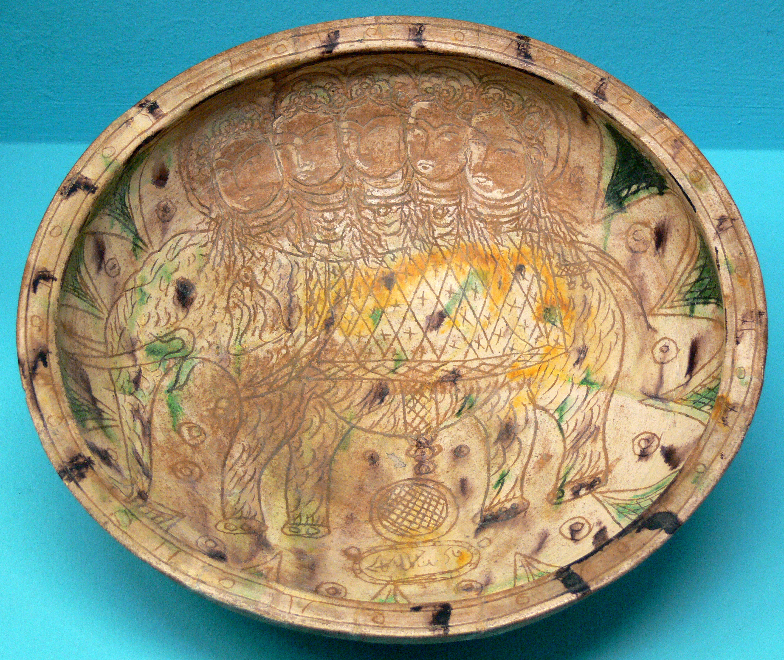 Schale mit Elefantendarstellung; Irdenware mit Laufglasuren in manganbraun, gelb und grün; Dekor: Sgraffito, Inschrift im Nashi-Duktus; Iran, 12. Jh. Linden-Museum, Stuttgart